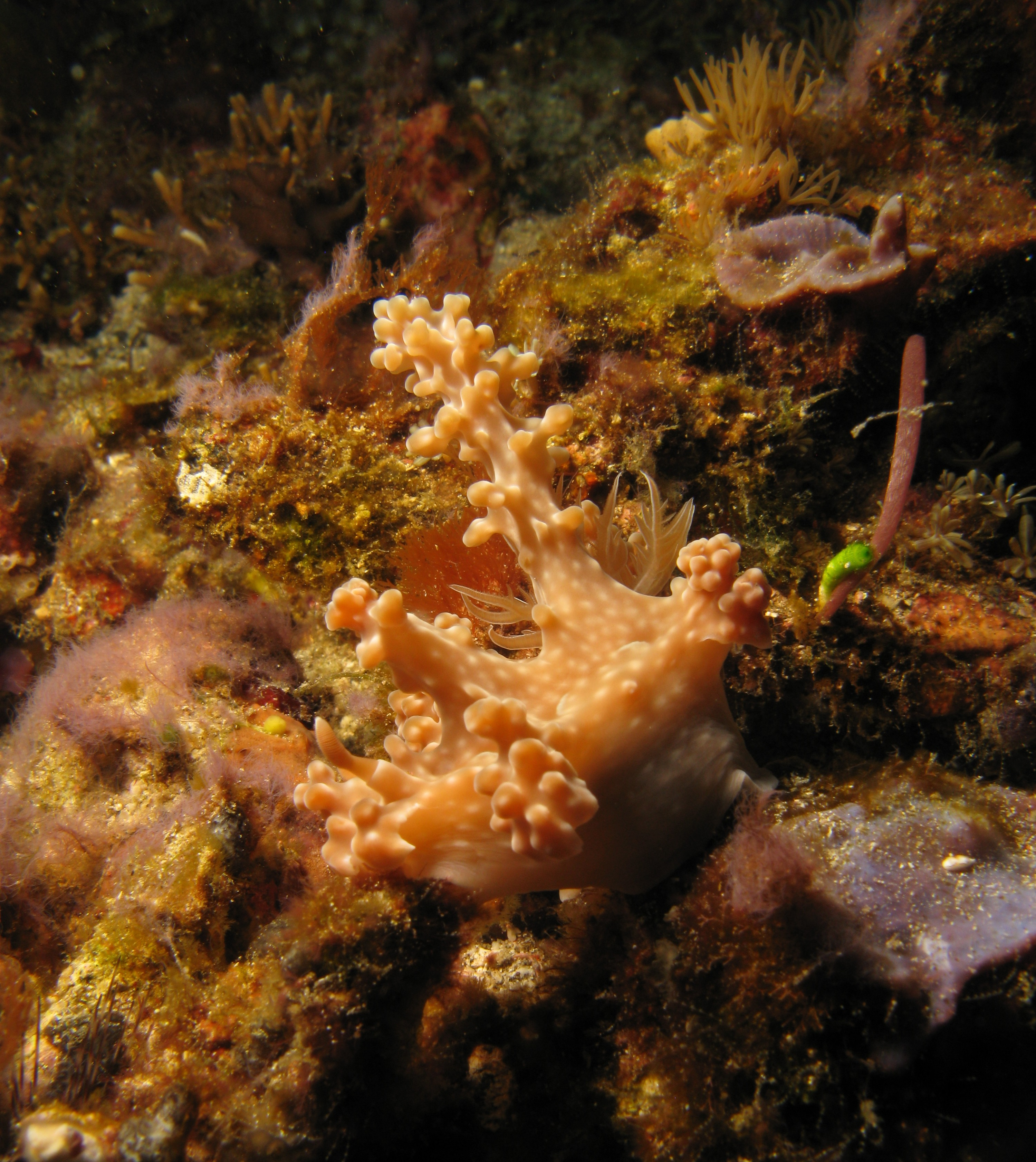 Miamira alleni (sinonimia: Ceratosoma alleni) en Dili, Timor Oriental